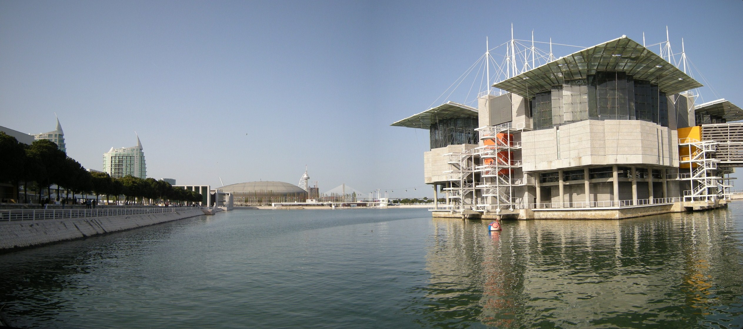 Lisboa, Portugal